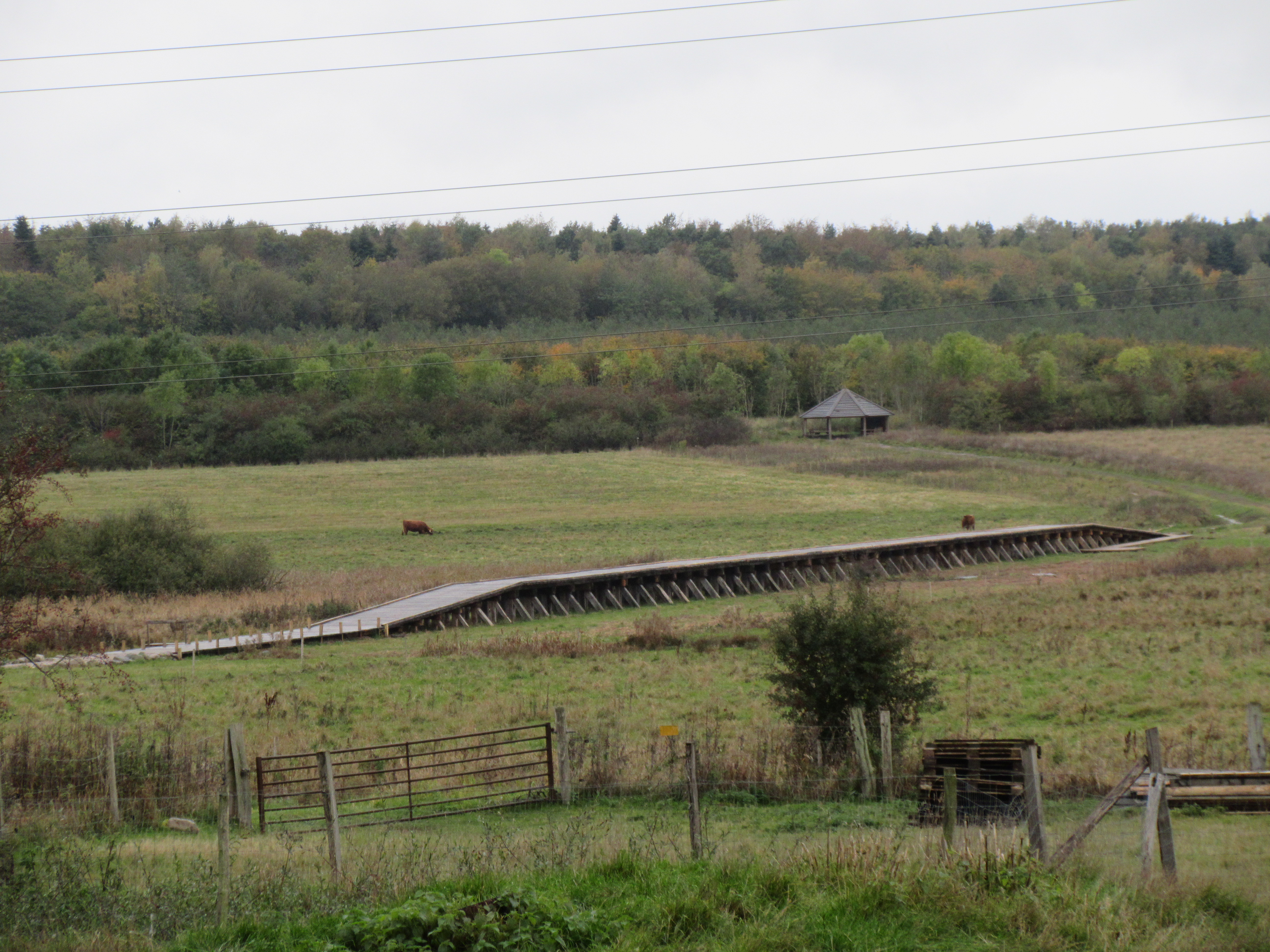 Vikingebroen over Store Vejleå og Ådalen, der forbinder Vikingelandsbyen og Kroppedal Museum, blev indviet d. 13. september 2019. Broen er bygget i samme stil som Harald Blåtands bro, Ravningbroen, dog ikke i fuld fortidig skala, men en anelse nedskaleret. Byggeteknik og konstruktionsprincipper er dog de samme, som dem man mener, var anvendt ved Harald Blåtands bro.